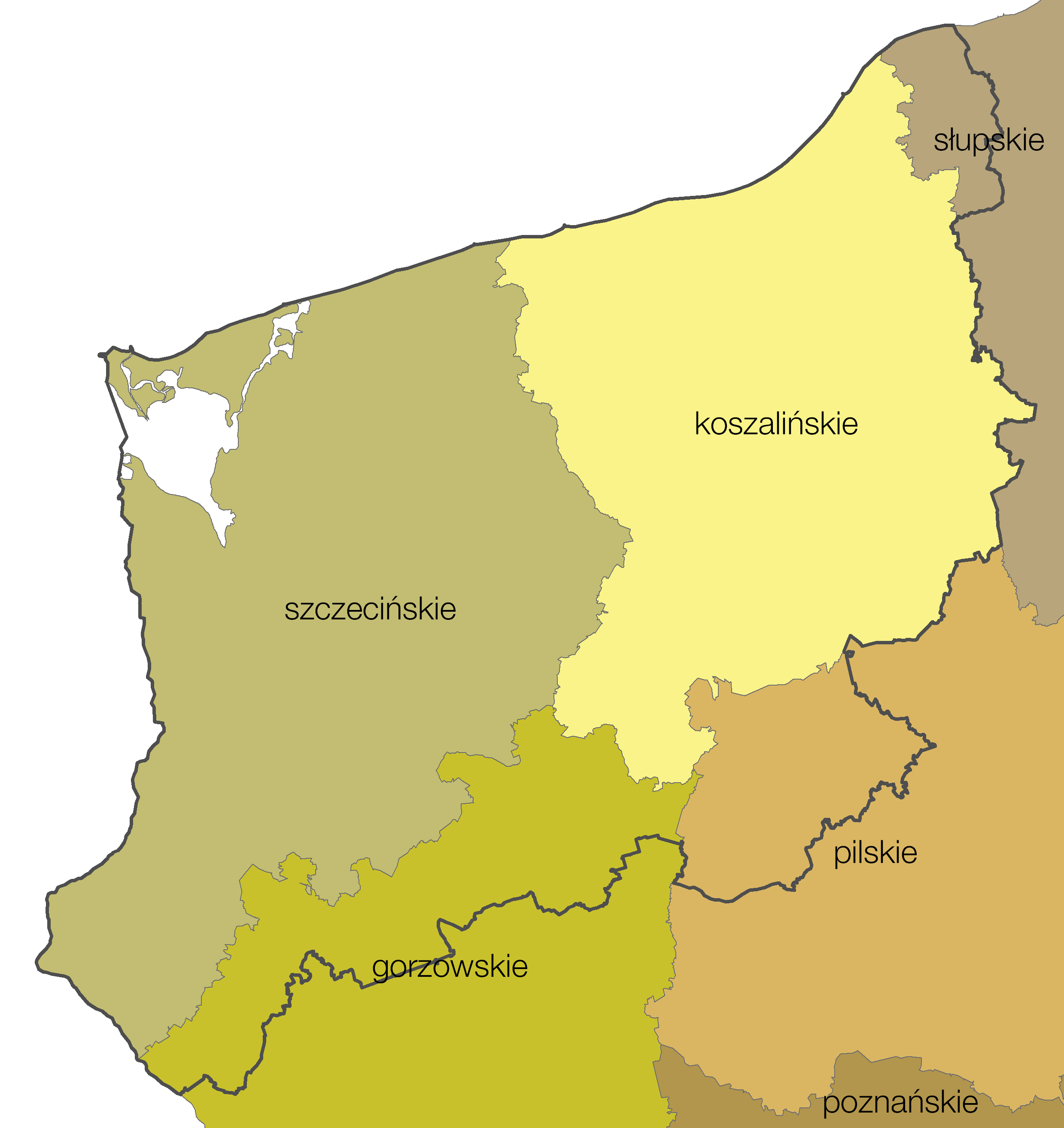 Województwo zachodniopomorskie (od 1999) jako powstałe z województw podziału administracyjnego Polski z lat 1975-1998